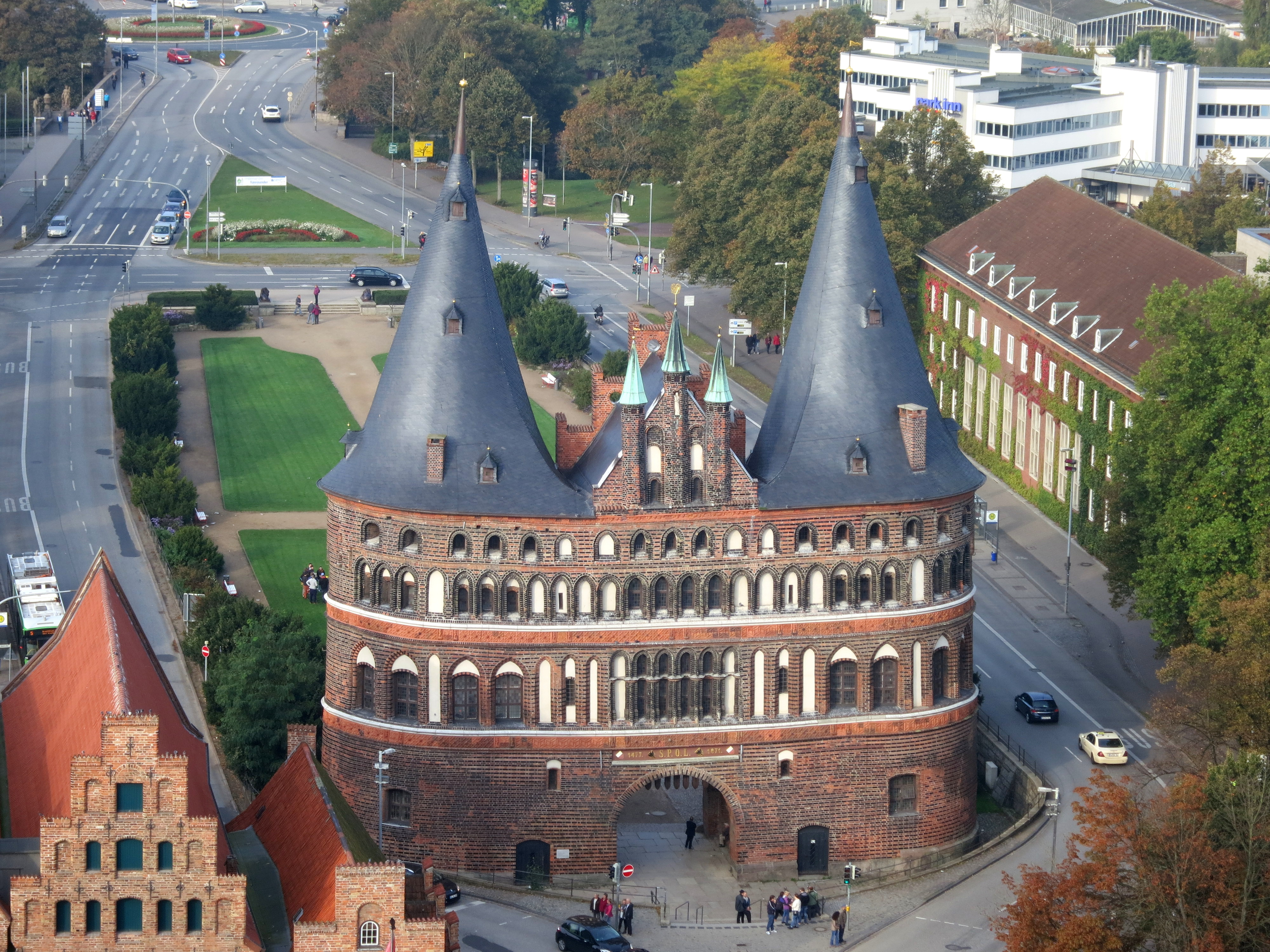 Holstentor in Lübeck